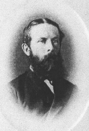 Julius Wilhelm Leberecht Mannhardt: Augenarzt, Schriftsteller, Diplomat